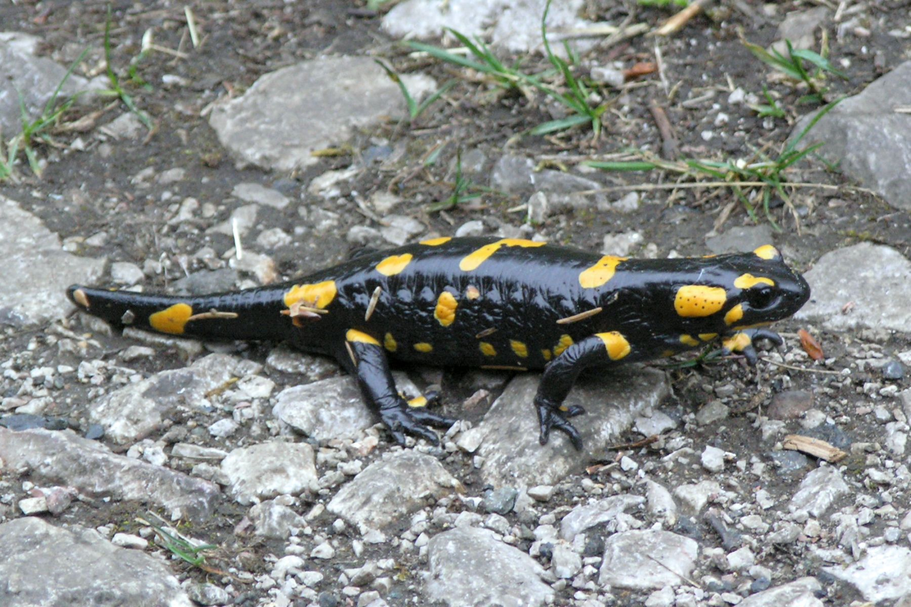 Salamandra salamandra (BiH, Sarajevo)